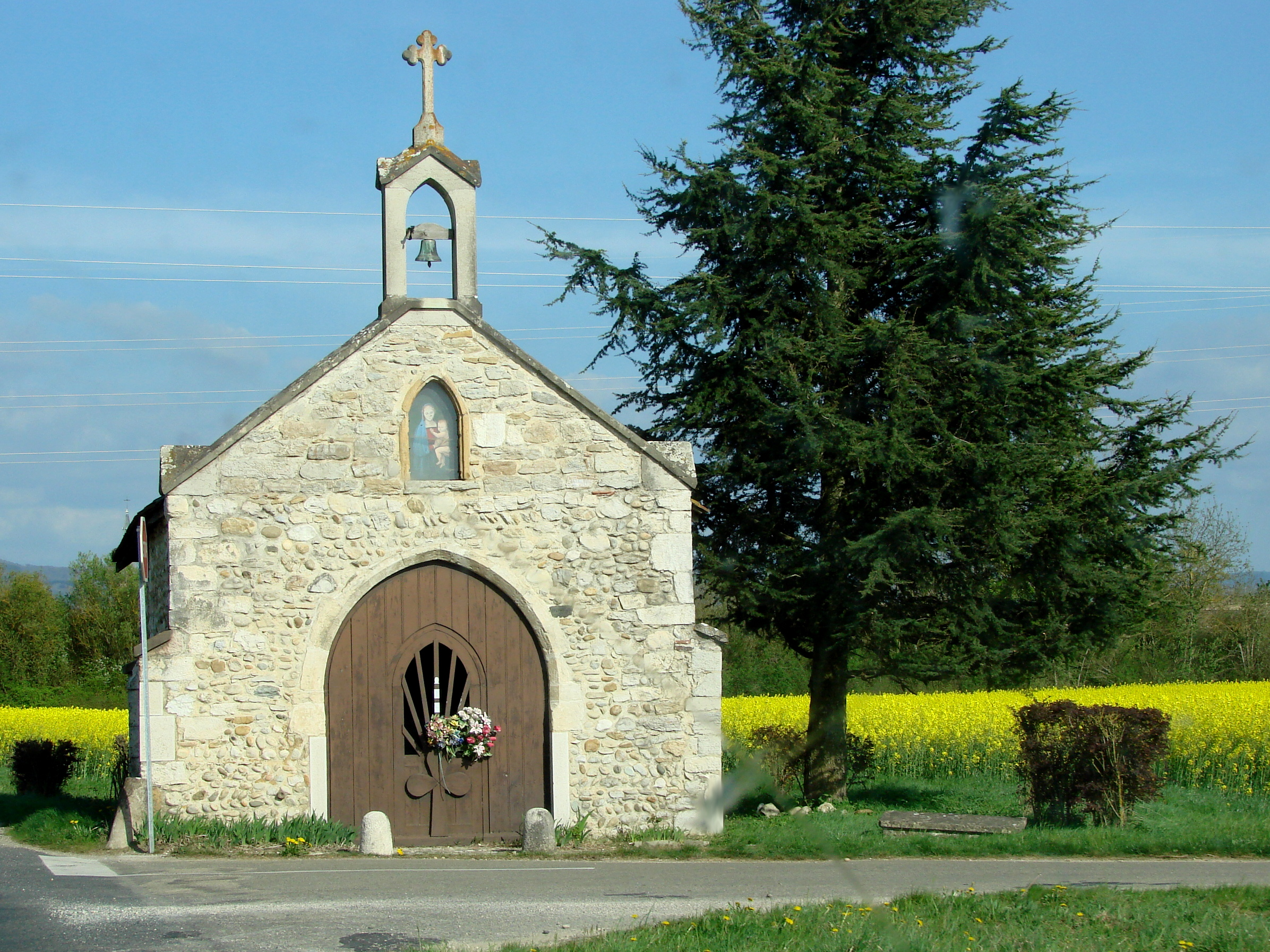 La chapelle Notre Dame de Lorette, à Sainte-Julie (Ain)